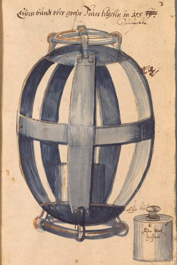 Feuerkugel aus Hans Georg Schirvatt: Kunst- und Artillerie-Buch. BSB Cod.icon. 232 ([S.l.] Süddeutschland 1622), Fol. 3r. Käfig einer Karkasse